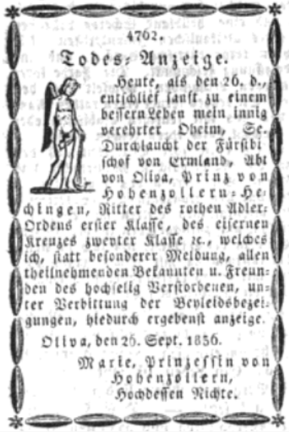 Traueranzeige Prinz Joseph von Hohenzollern-Hechingen, Fürstbischof von Ermland (* 20. Mai 1776 in Troppau; † 26. September 1836 auf Schloss Oliva).